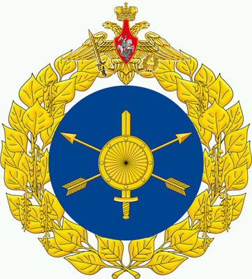 Большая эмблема РВСН РФ